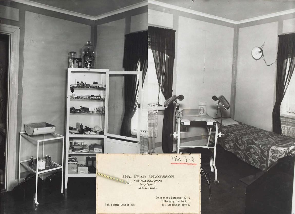 En kvinnoklinik i Saltsjö-Duvnäs där Ivar Olofsson utförde illegala aborter under 1930-talet. Bilden visar hur en av rummen såg ut i kliniken.